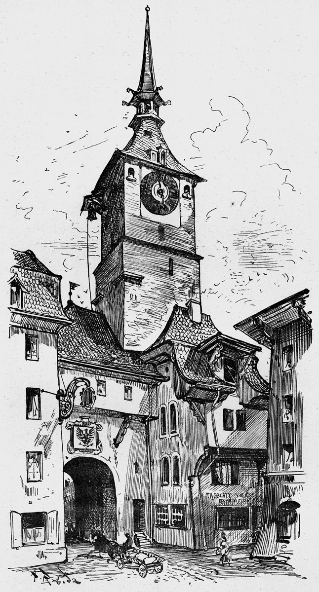 Albert Robida: Obertorturm in Aarau, Switzerland, from: Robida: Les vieilles villes de Suisse. Notes et souvenirs, Paris, Maurice Dreyfous, 1879